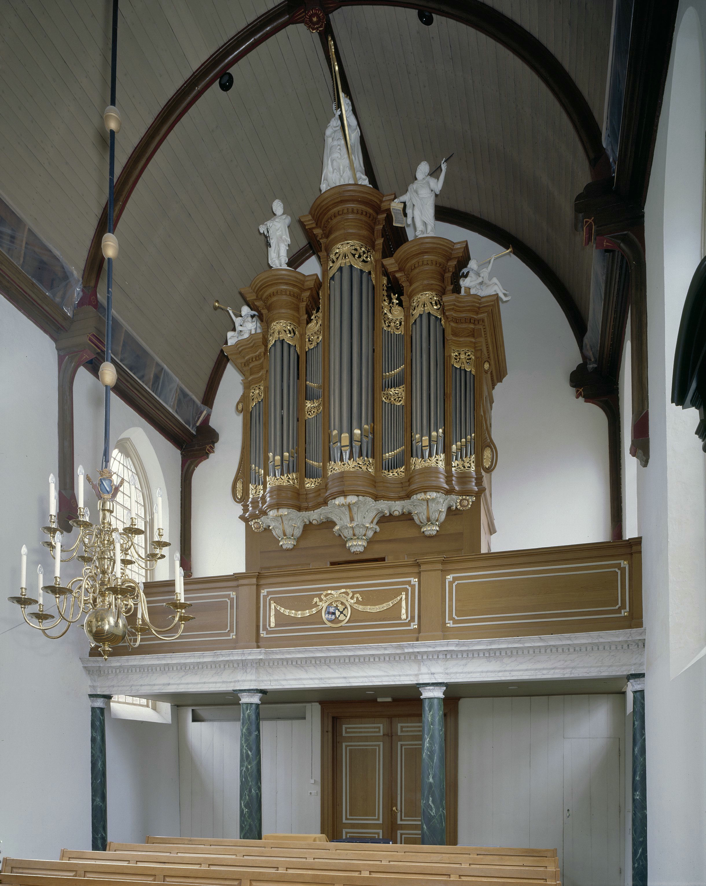 Nederlands Hervormde Kerk: Interieur, aanzicht orgel, orgelnummer 911 (opmerking: Gefotografeerd voor Het Historische Orgel in Nederland 1769-1790, bladzijde 372)